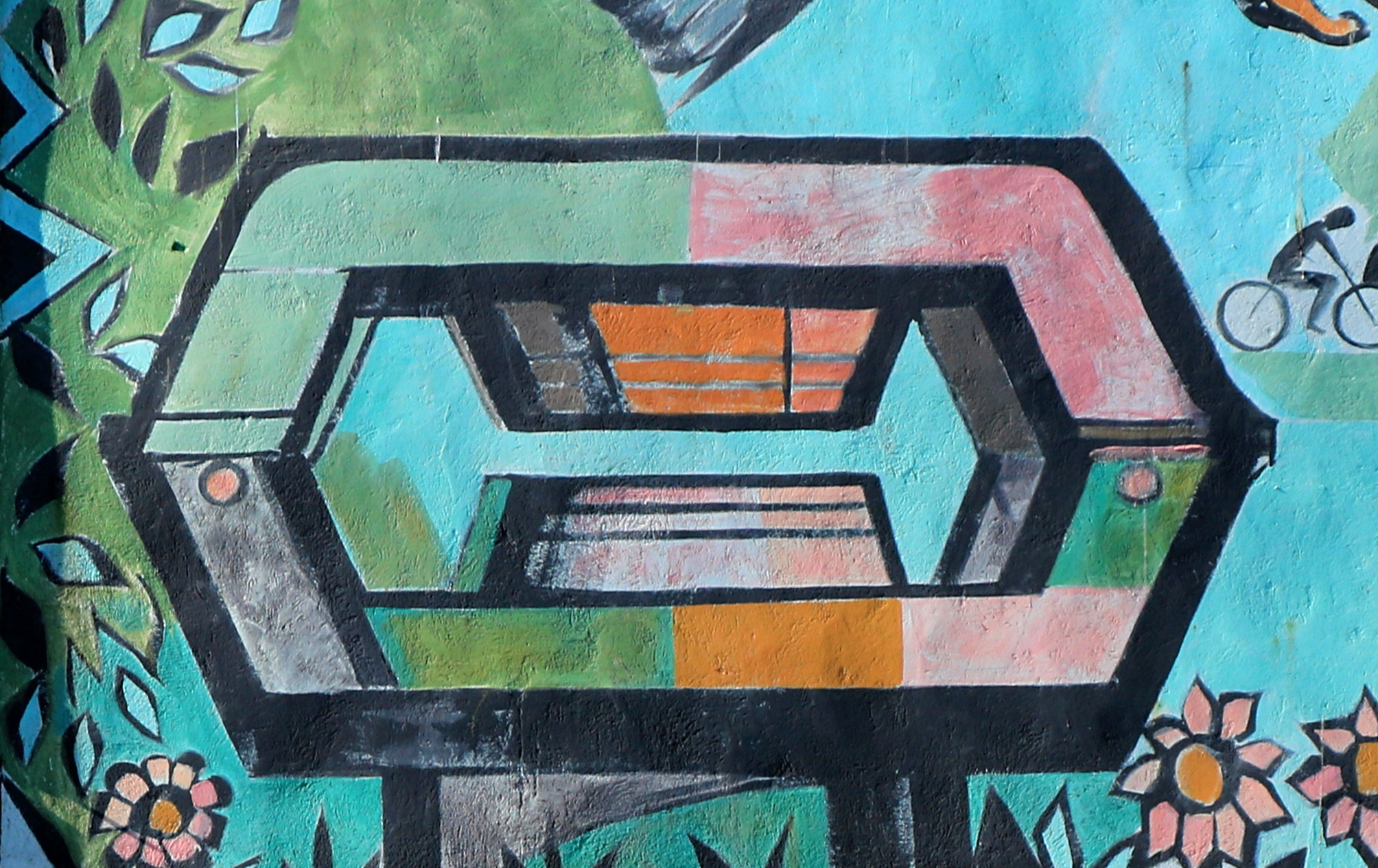 Belgique - Ottignies - Centre culturel - Fresque Rahir «La Liesse populaire» (1993) : le cœur du premier cyclotron belge (1947) exposé à Louvain-la-Neuve